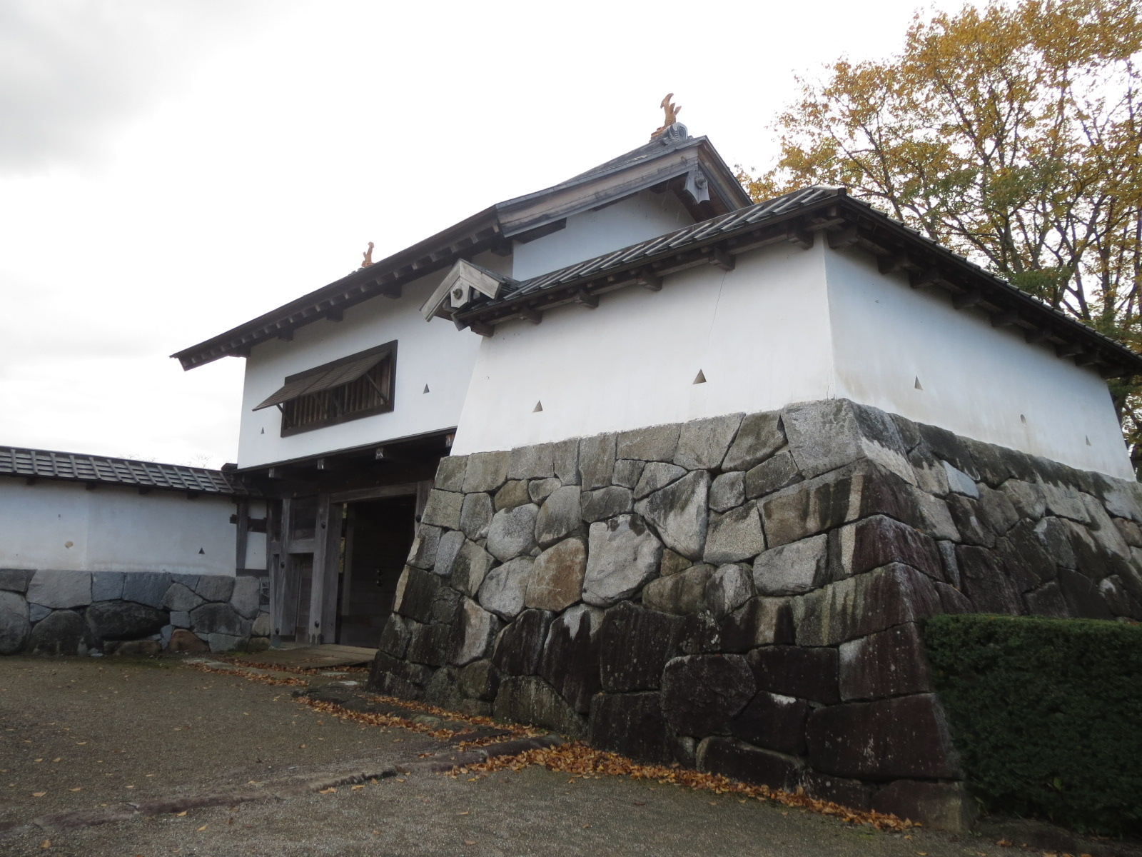 花巻城西御門